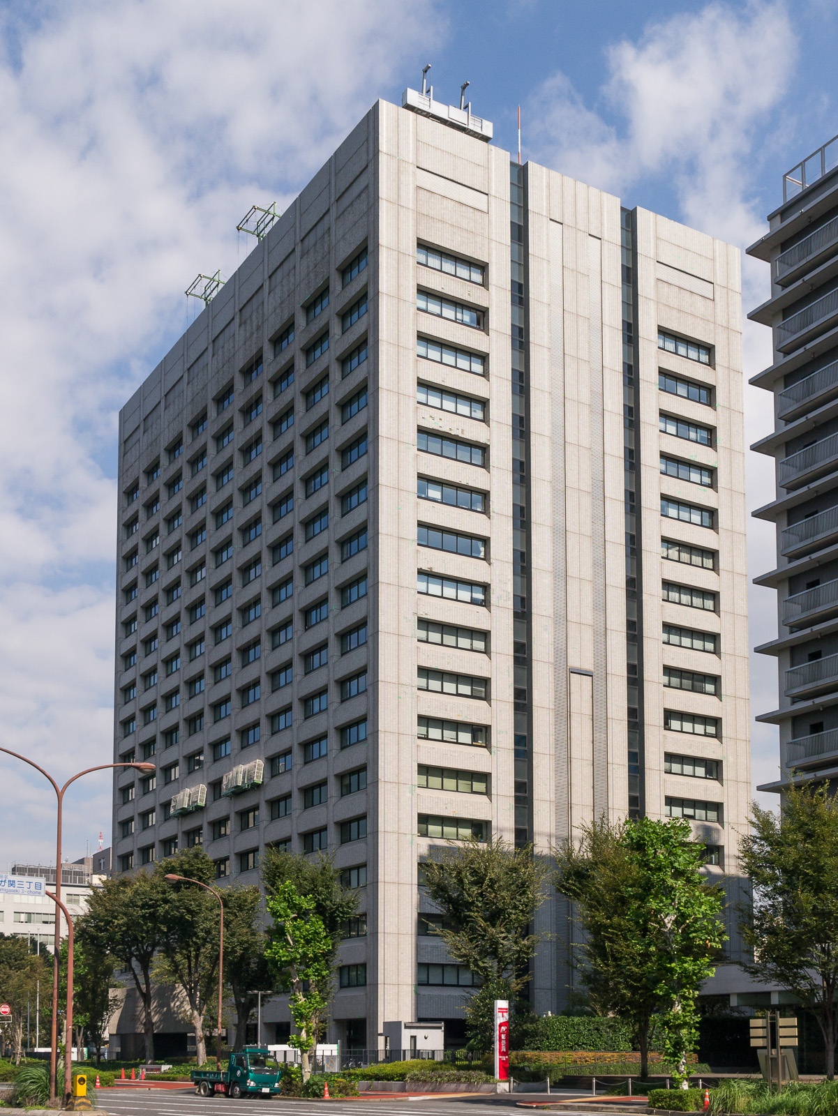 経済産業省本館、東京都千代田区霞が関。